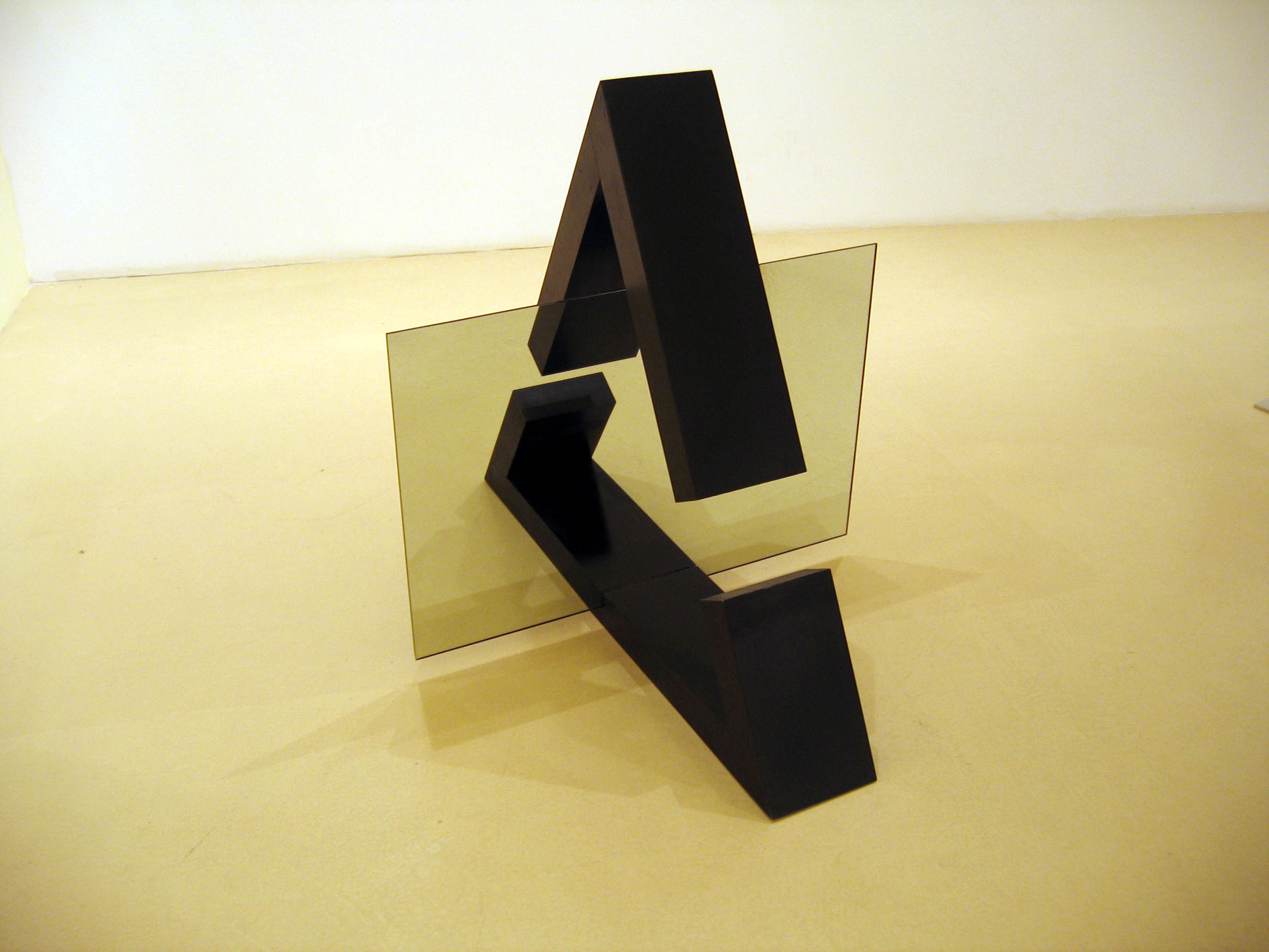 Sculpture